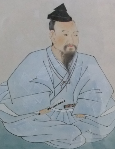 a Japanese man 益田宗兼 (Munekane Masuda)